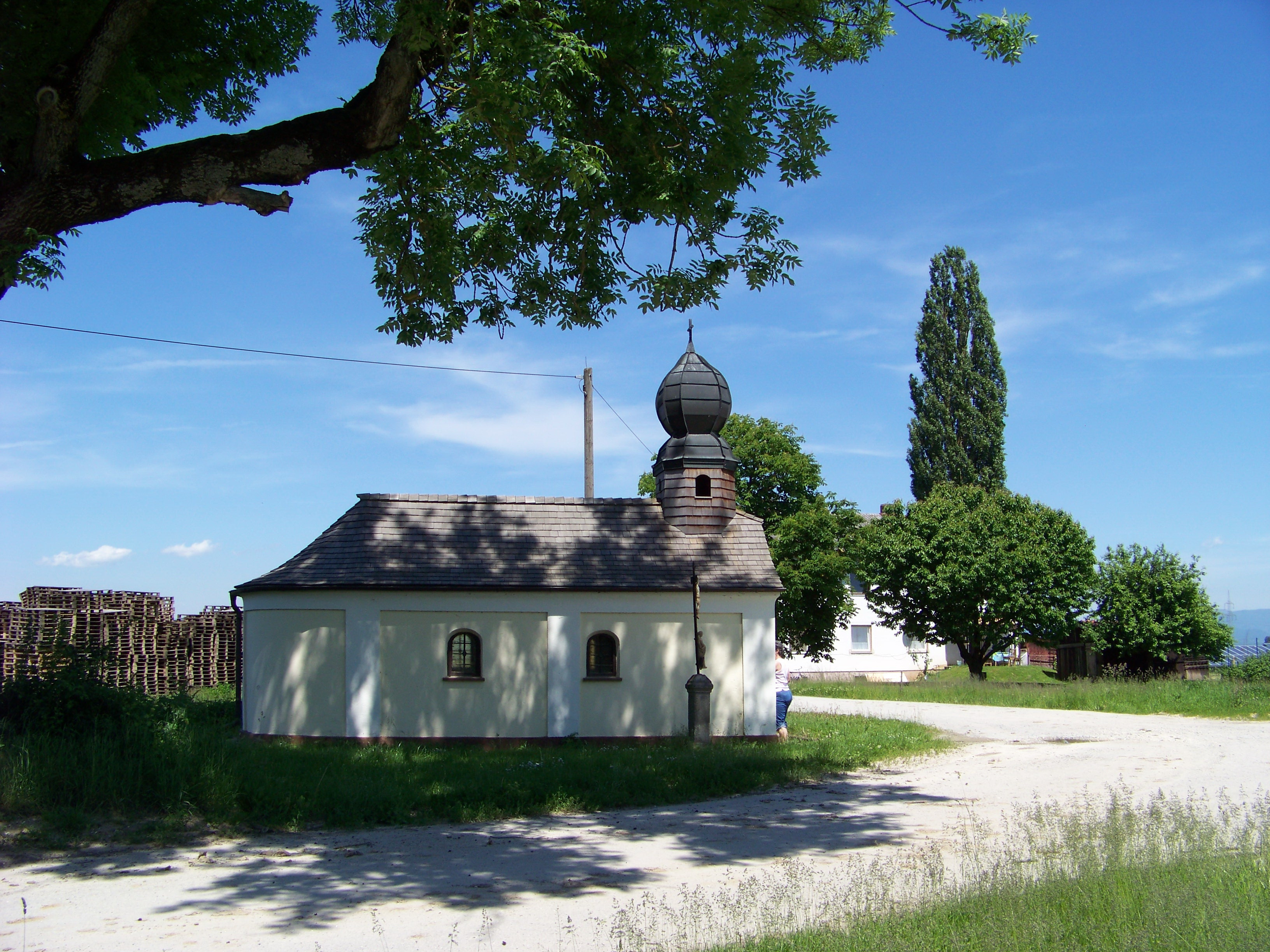 Straßkirchen, Gänsdorf 5. Ortskapelle wohl 2. Hälfte 18. Jahrhundert; mit Ausstattung.